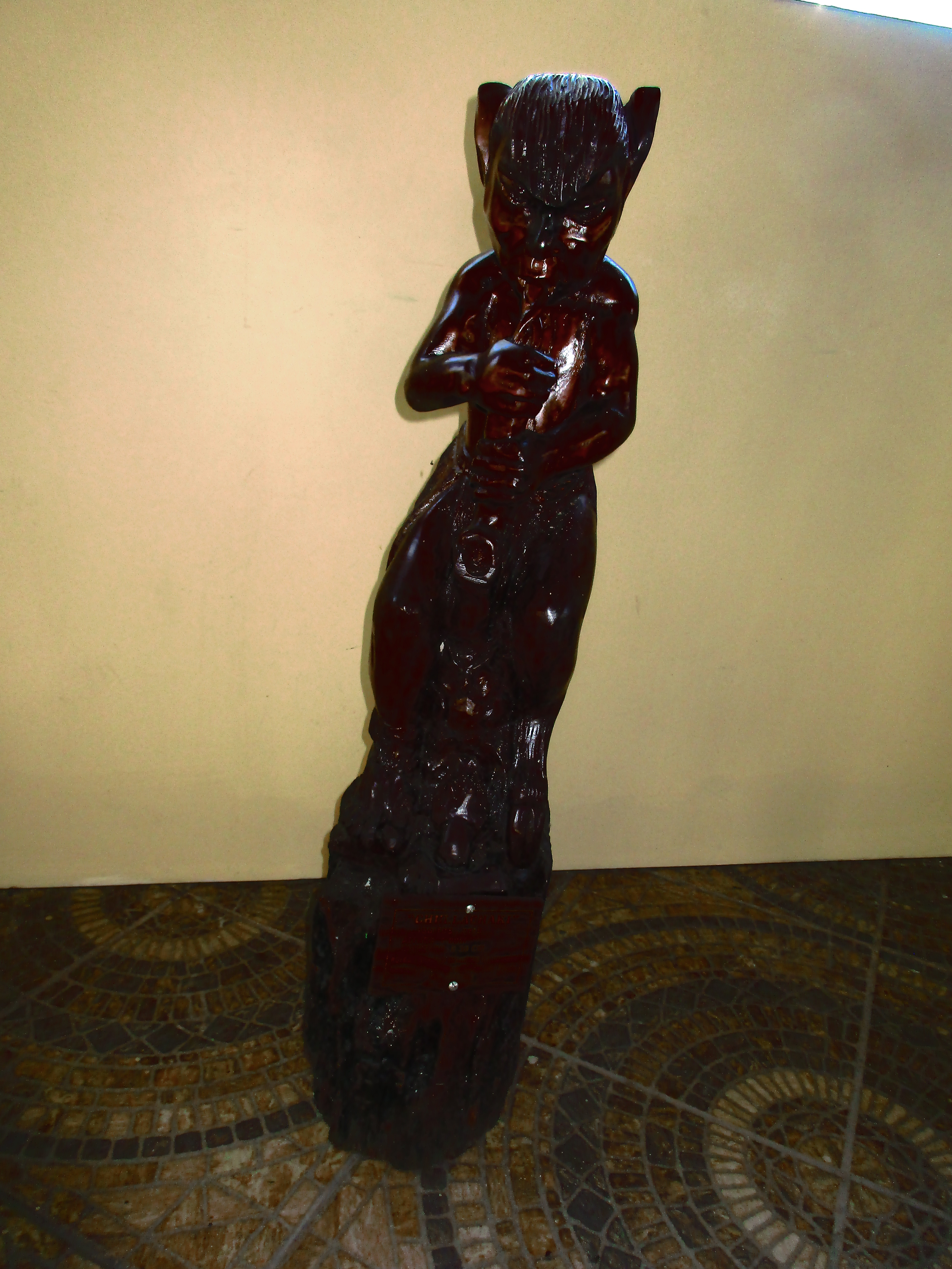 Estatuilla de Chullachaqui en Los Paucares Inn, Iquitos, Perú